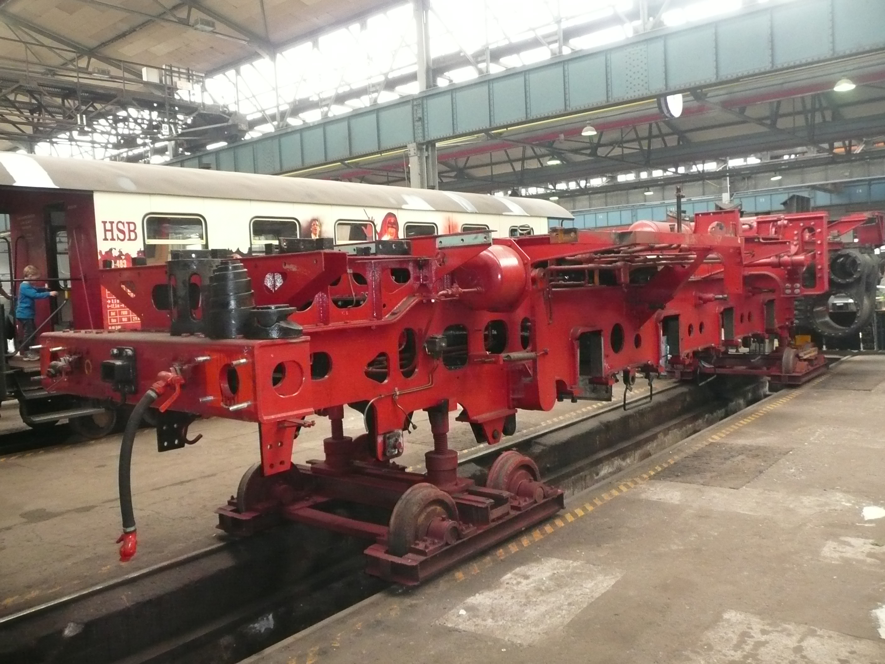 Blechrahmen der Fk 262 bei der Aufarbeitung im Dampflokwerk Meiningen